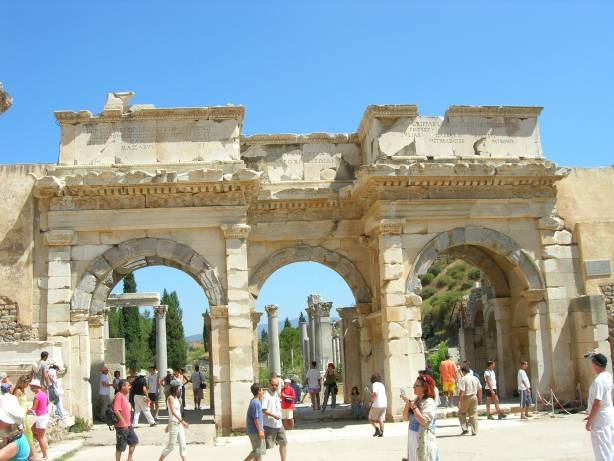 Ephesus.